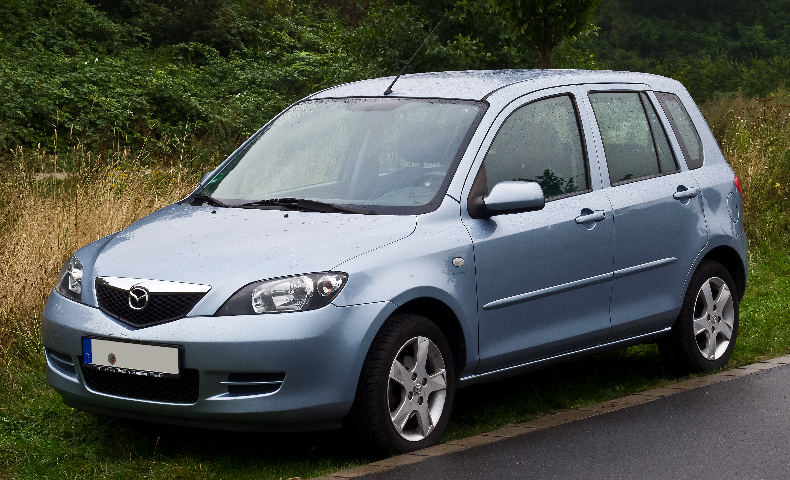 Mazda2 (DY)